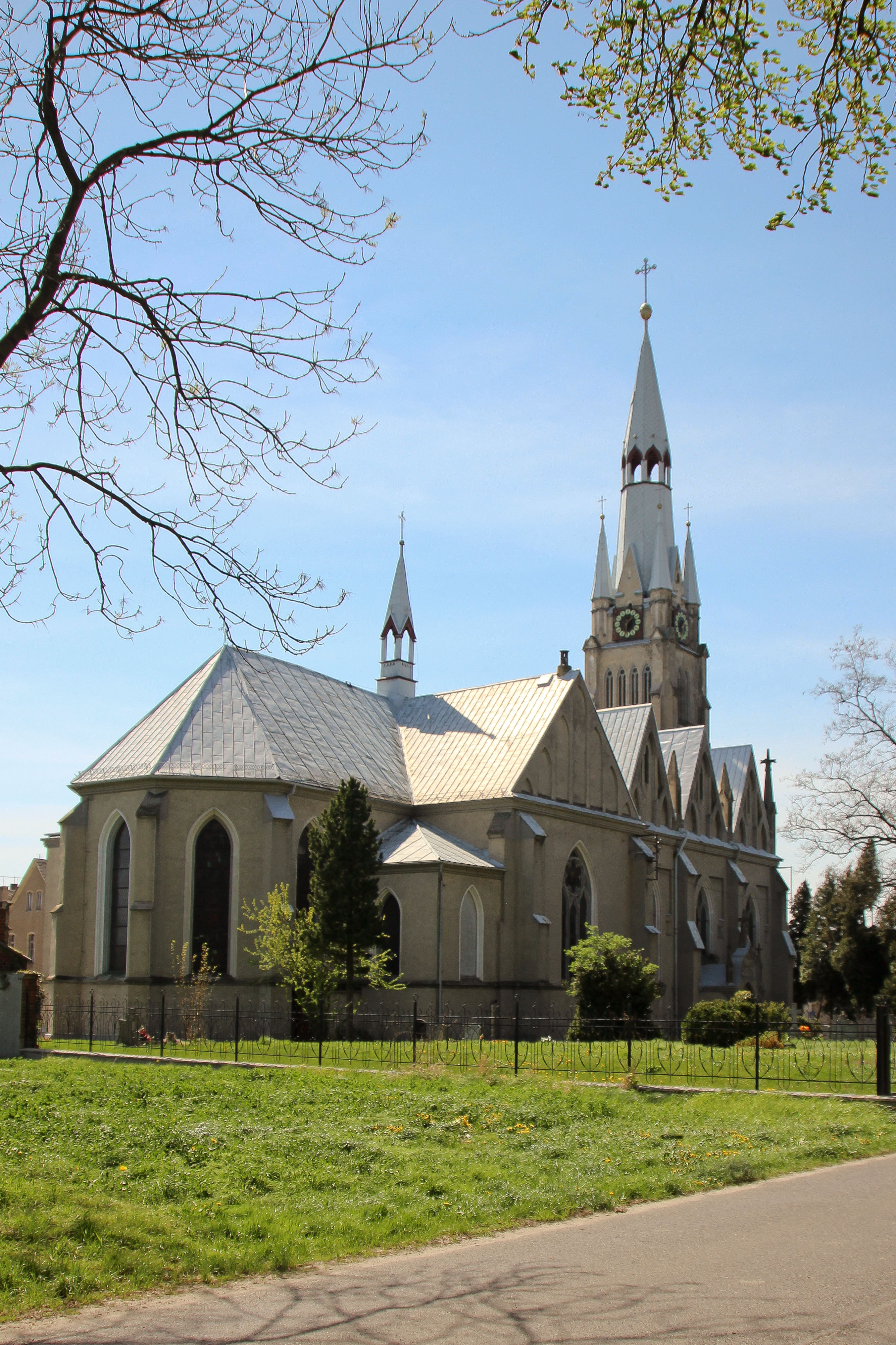 Branice, ul. Kościelna - kościół parafialny p.w. Wniebowzięcia NMP, XIII, XIX/XX w. (zabytek nr 48/48 z 25.11.1948)